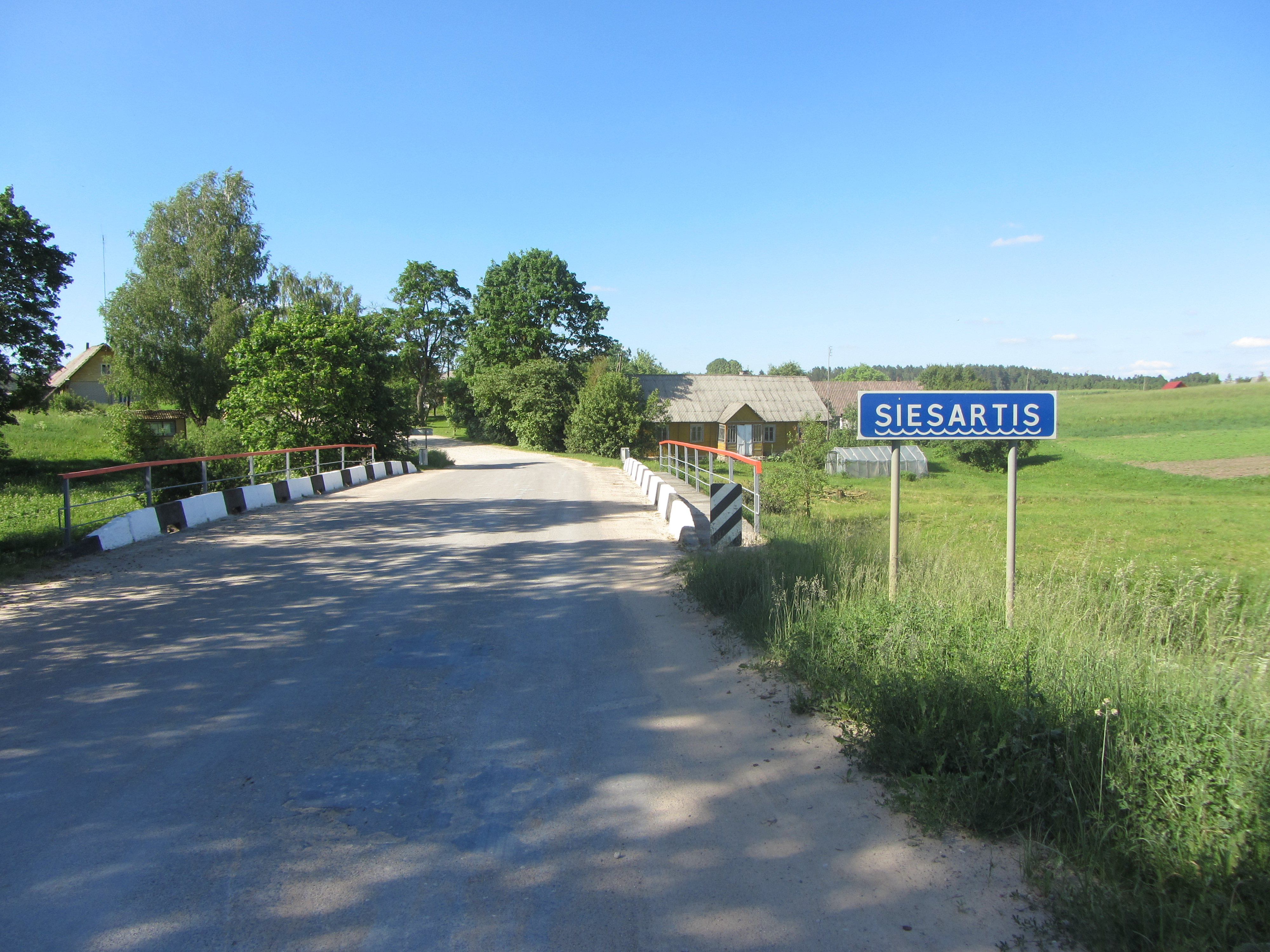 Videniškių sen., Lithuania